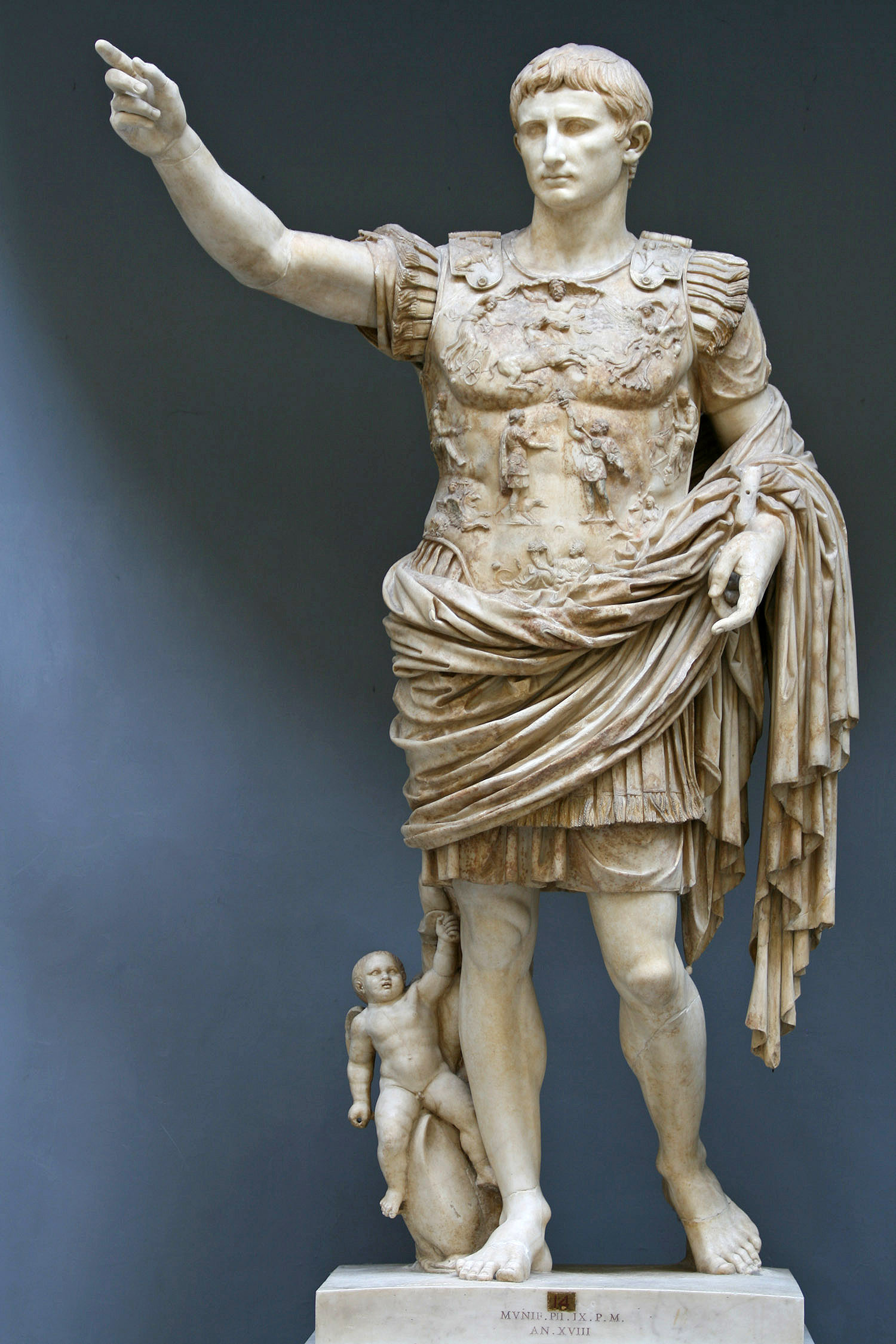 front view